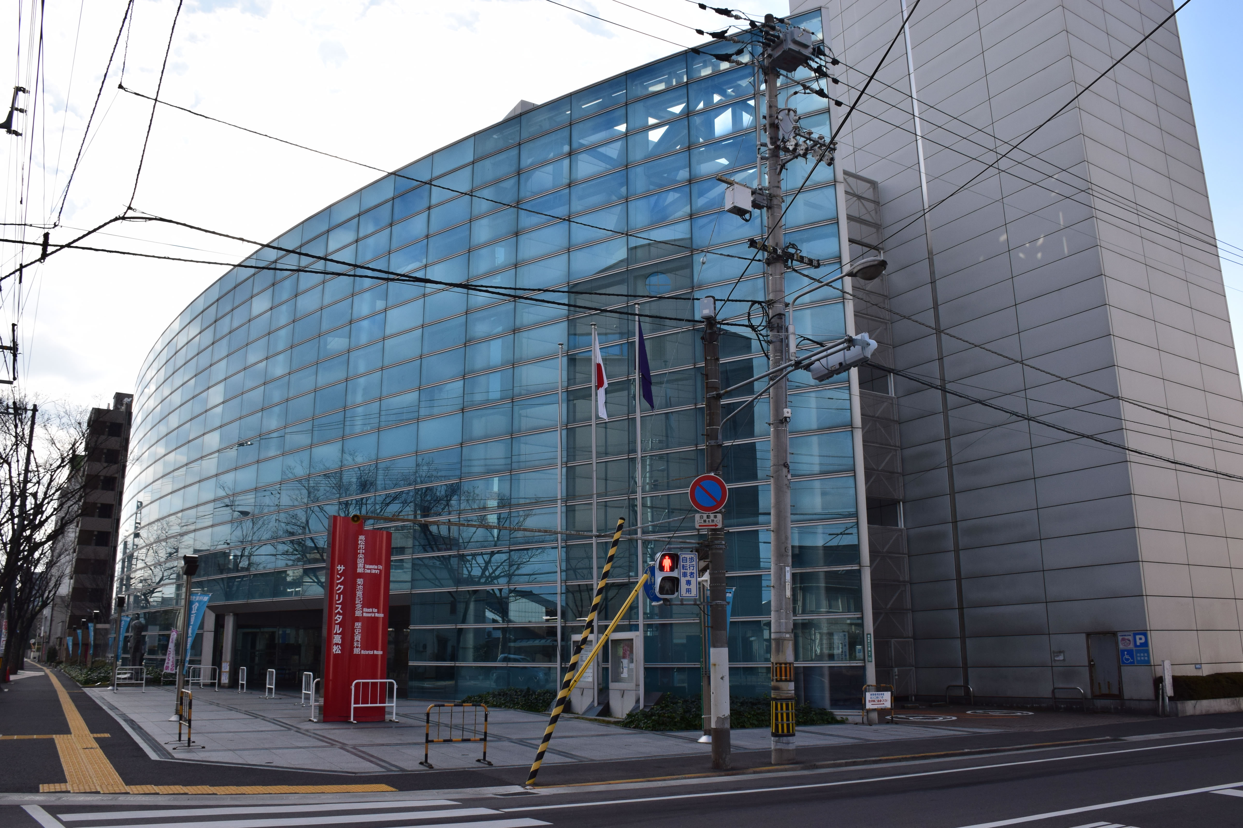 香川県高松市のサンクリスタル高松。高松市中央図書館などが入っている。